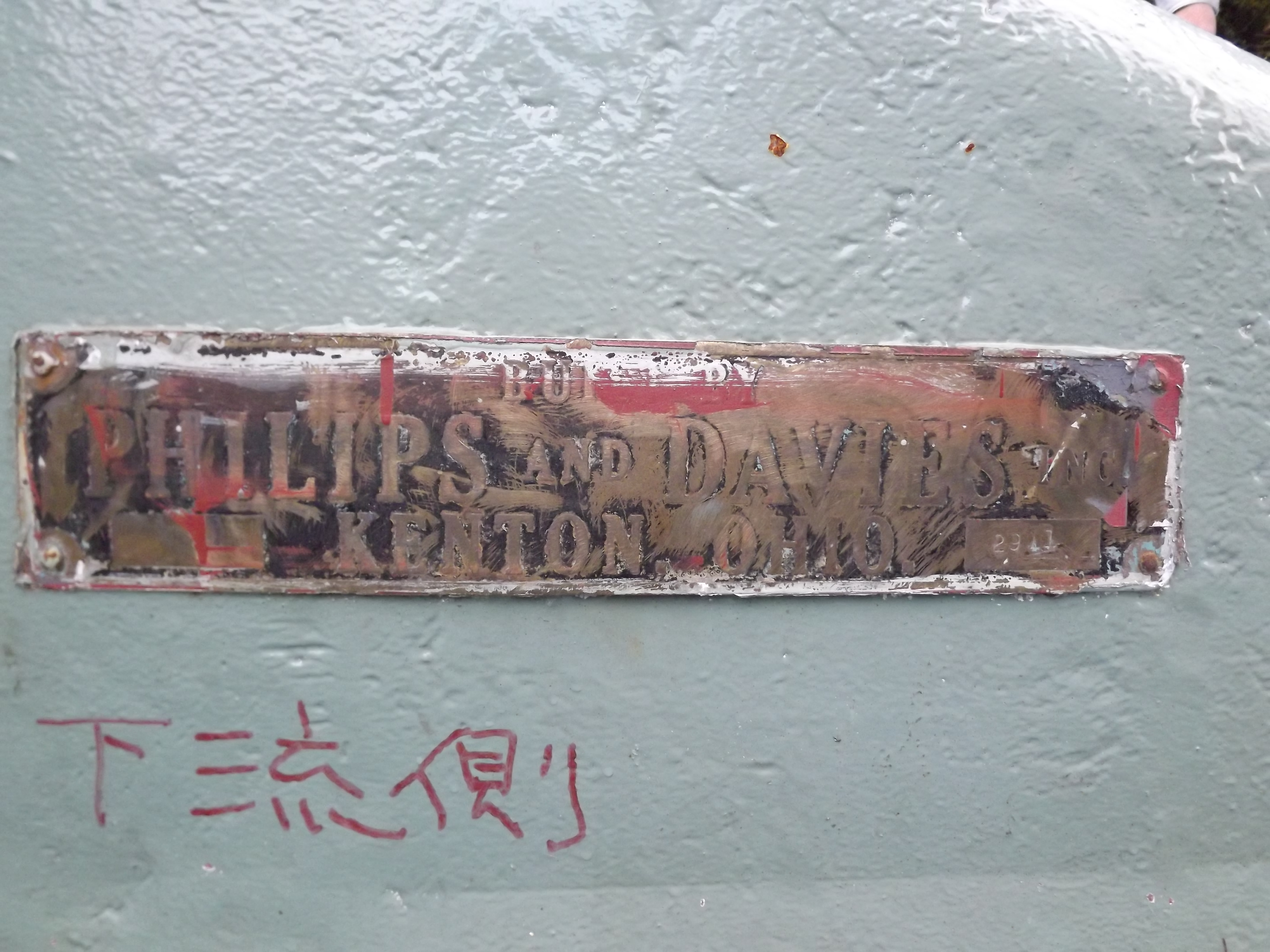 田瀬ダムコンジットゲート油圧シリンダに貼付された製造会社の銘板